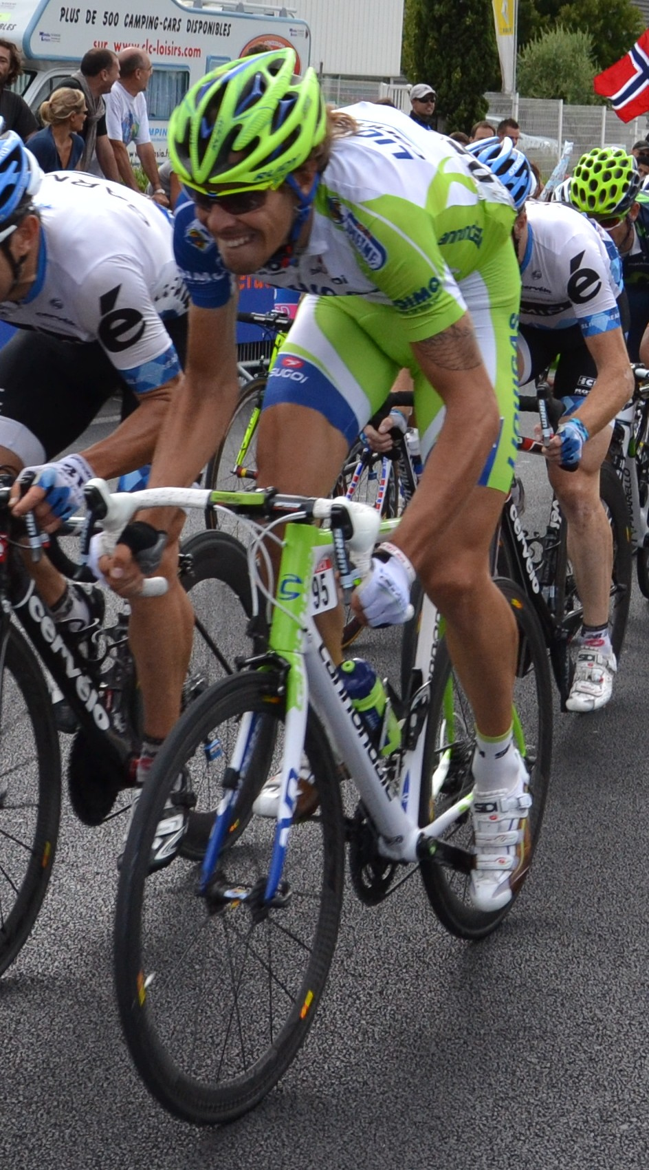 Daniel Oss lors de l'arrivée de la 15e étape du Tour de France 2011 à Montpellier.